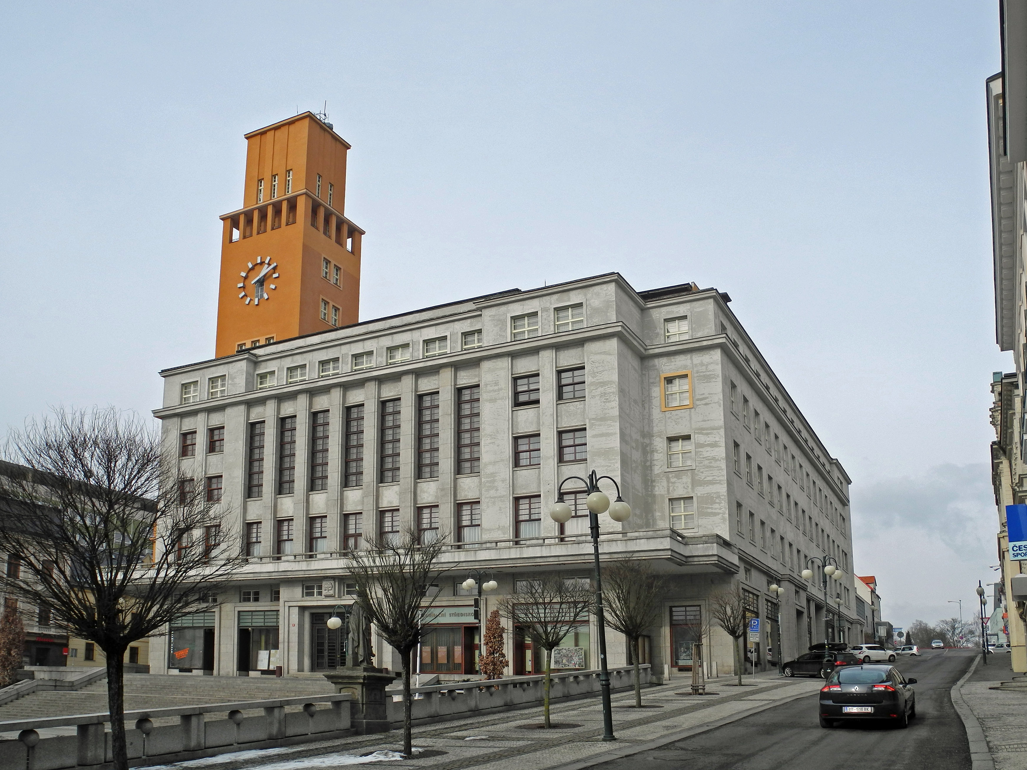 Neues Rathaus in Gablonz an der Neiße (Jablonec nad Nisou)